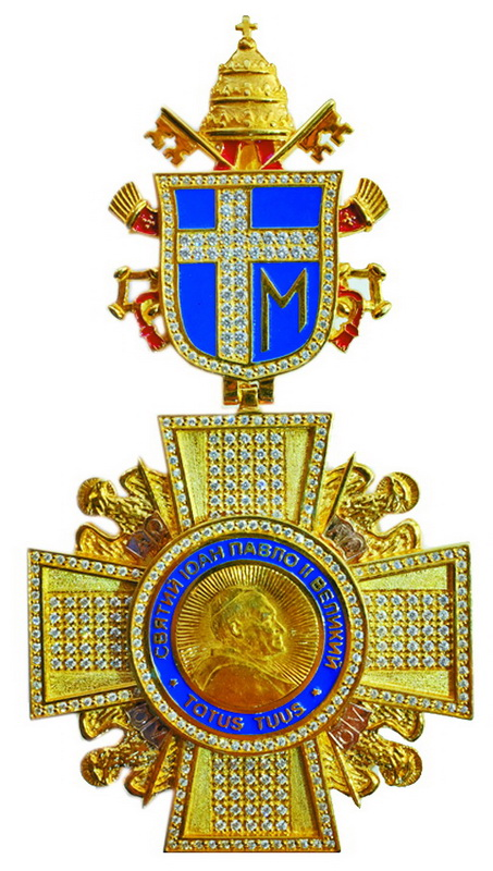 Орден Івана Павла ІІ